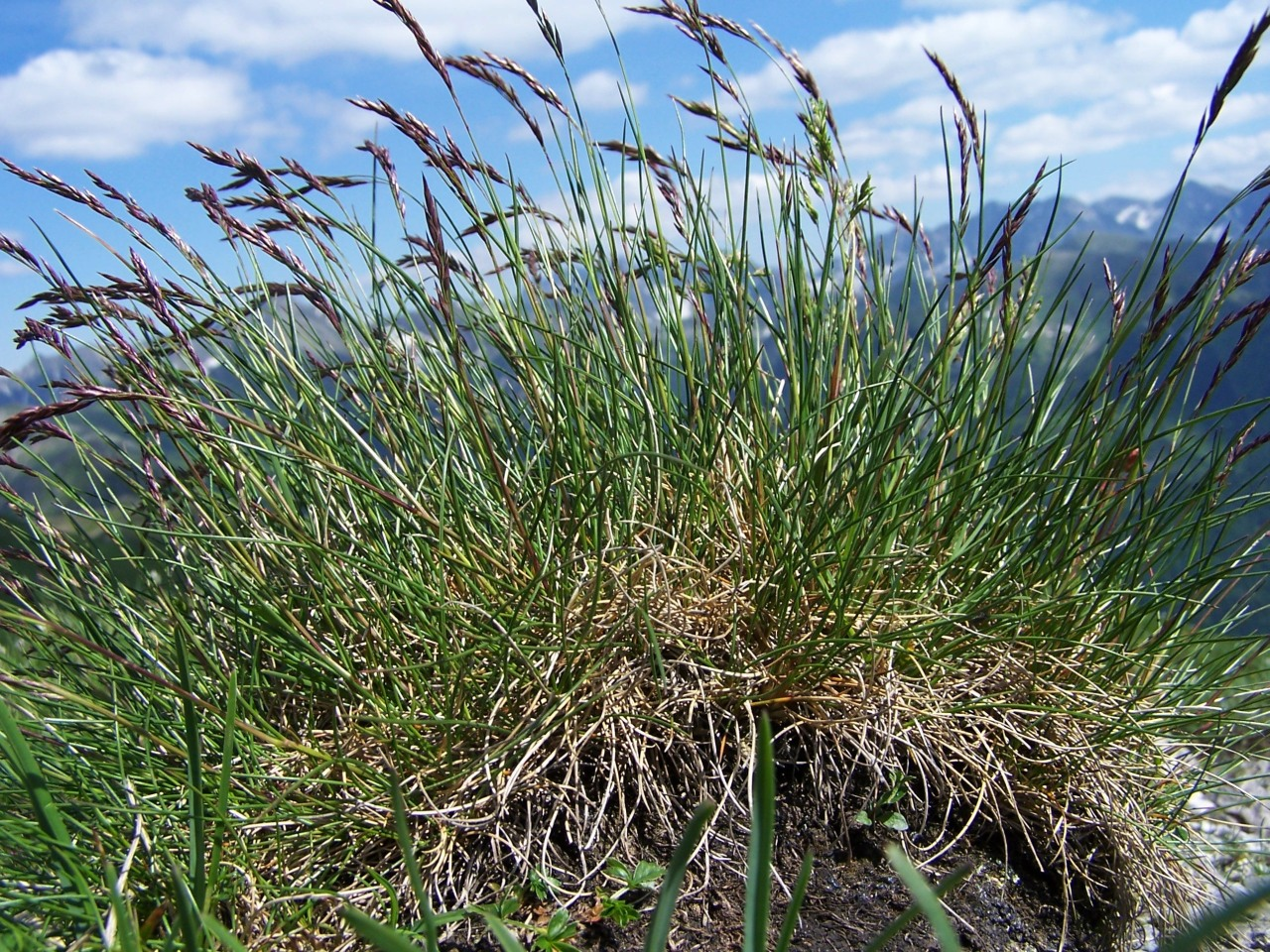 Festuca versicolor (habitat:Tatra Mountains)